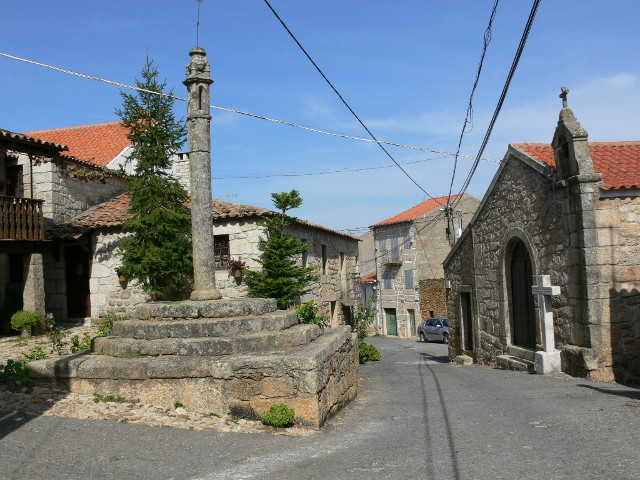 Pelourinho da Bemposta - Penamacor